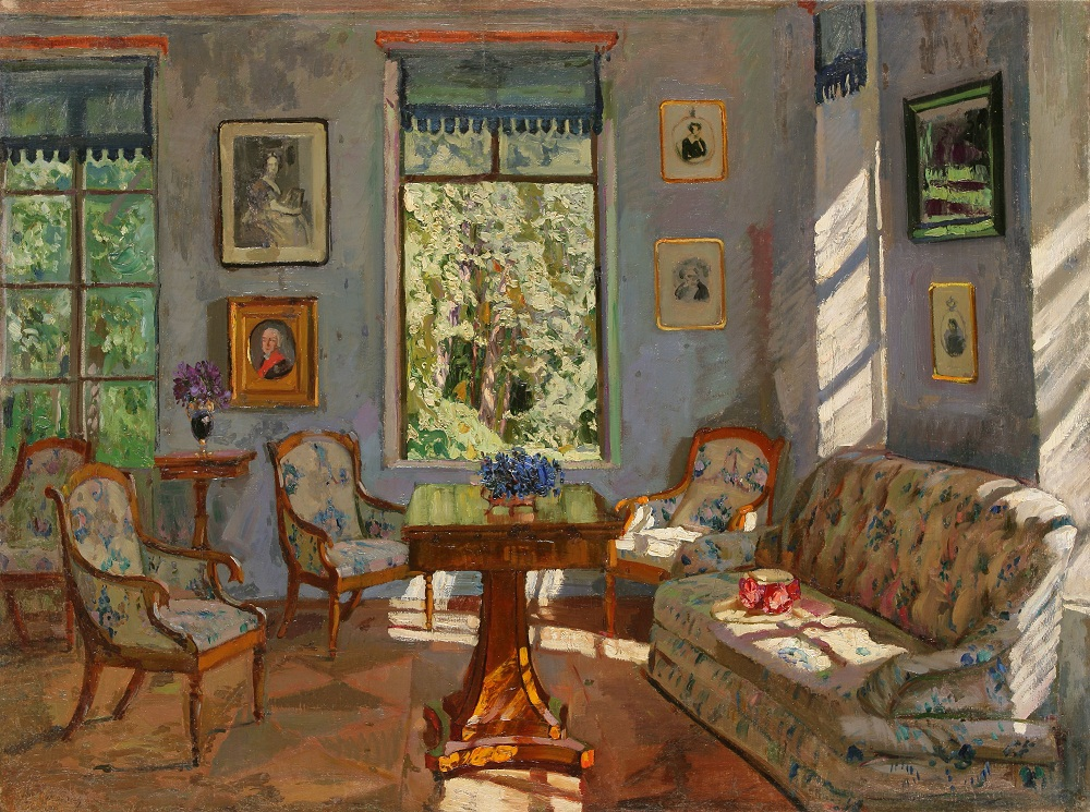 Холст, масло. 79,8х106